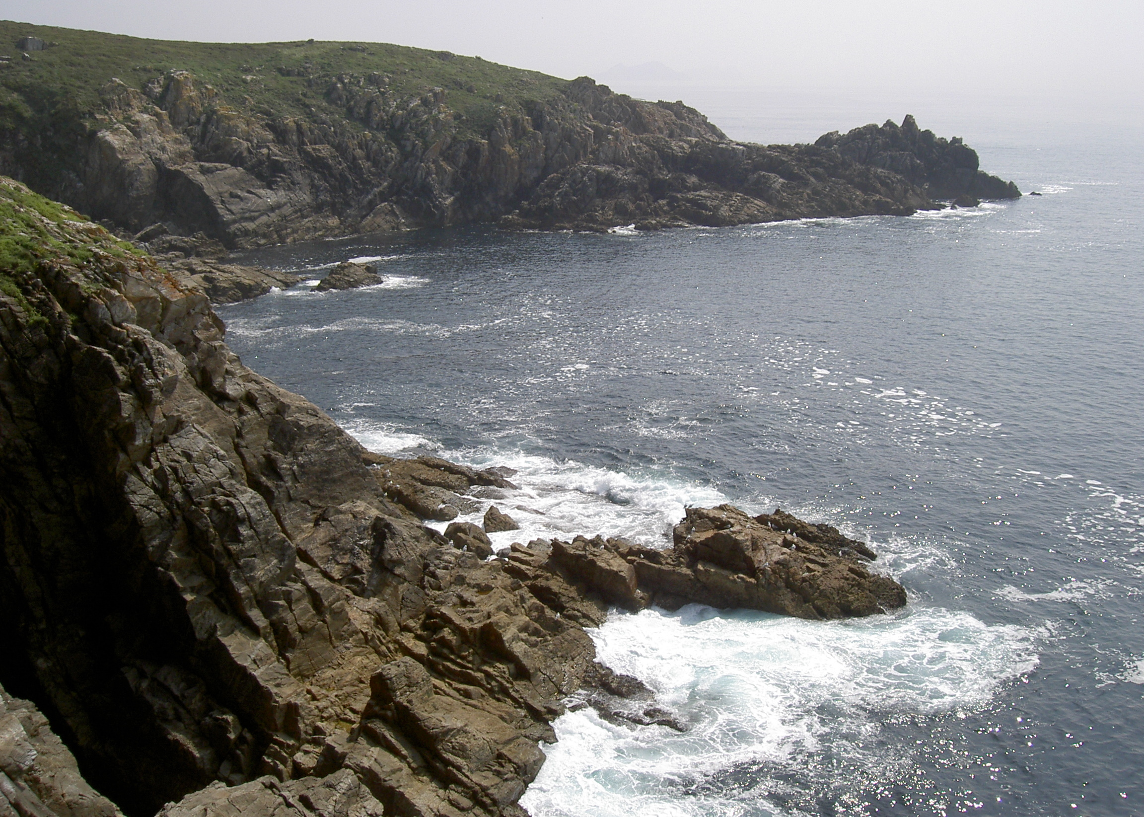 Vista desde o mirador do Buraco do Inferno na illa de Ons.